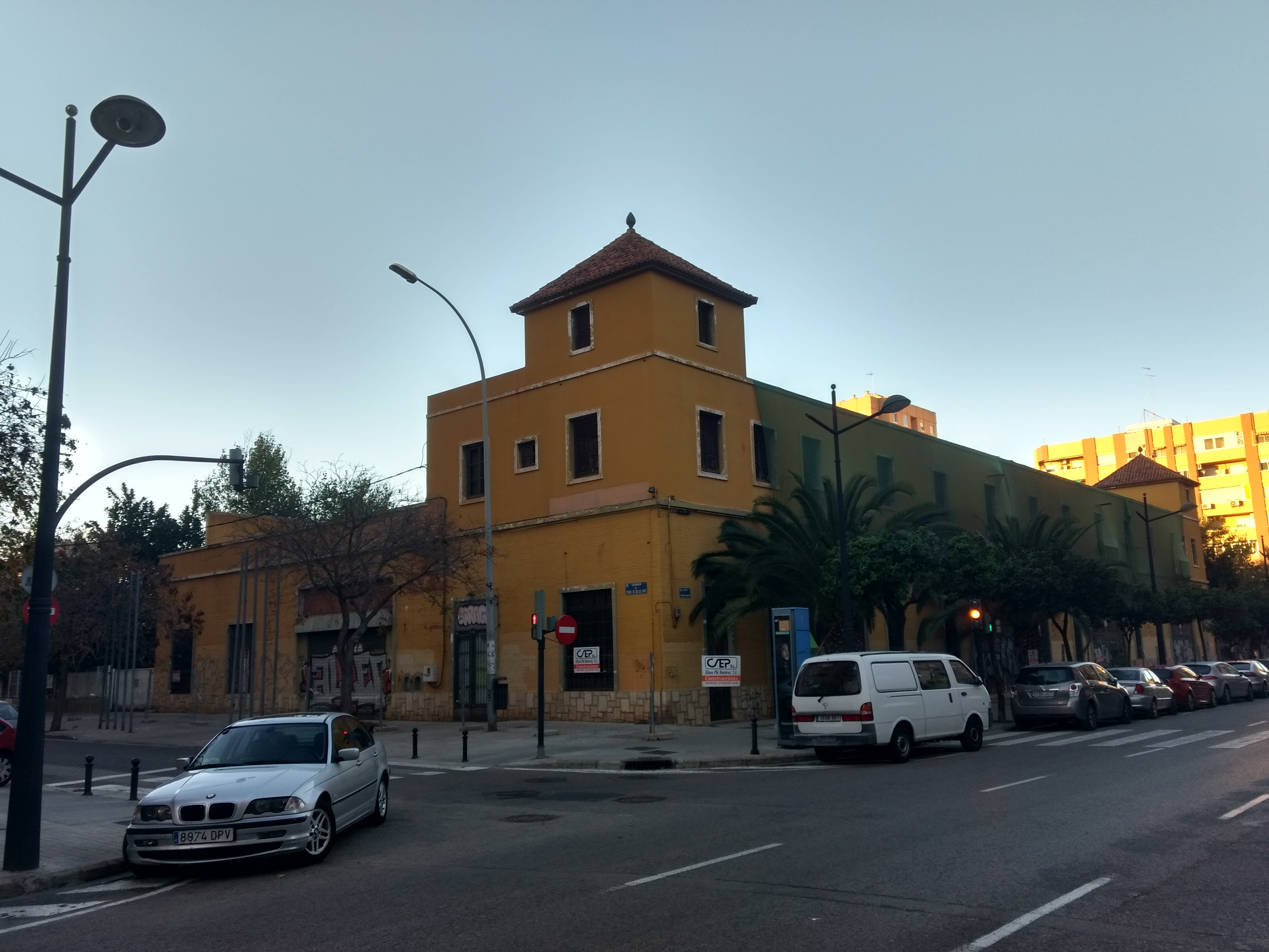 Arena Auditòrium al novembre de 2017, poc abans que fóra definitivament reconvertit en supermercat